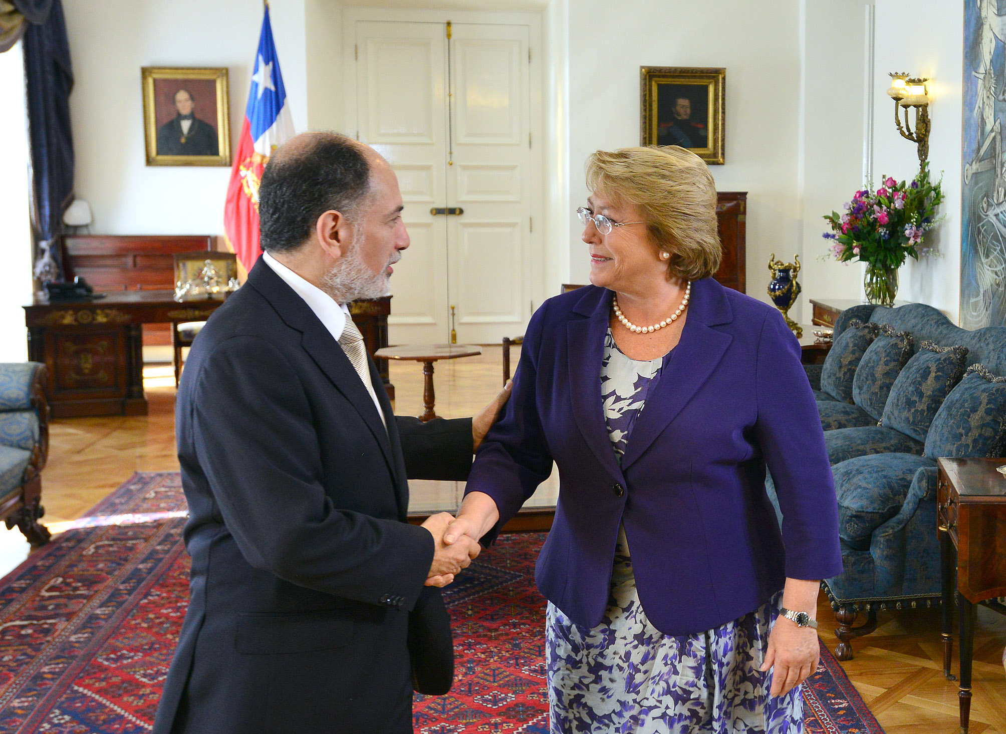 La Presidenta Bachelet recibe el saludo protocolar del presidente de la Corte Suprema, Sergio Muñoz